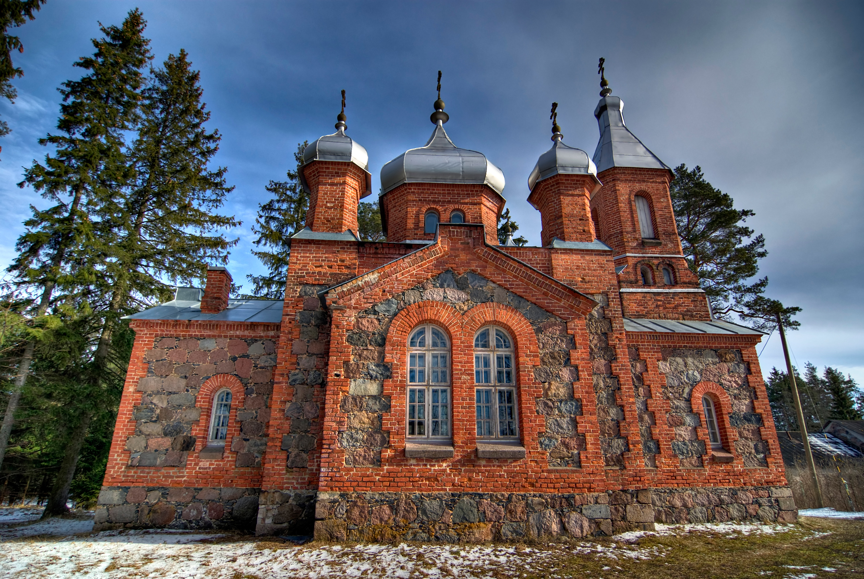 Kärsa õigeusu kirik (1878-1879).